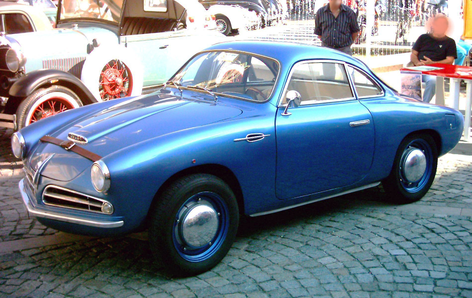 Panhard Dina X86 Berlinetta, carrozzata Allemano su disegno di Giovanni Michelotti. Presentata al Salone dell'Automobile di Torino nel 1951